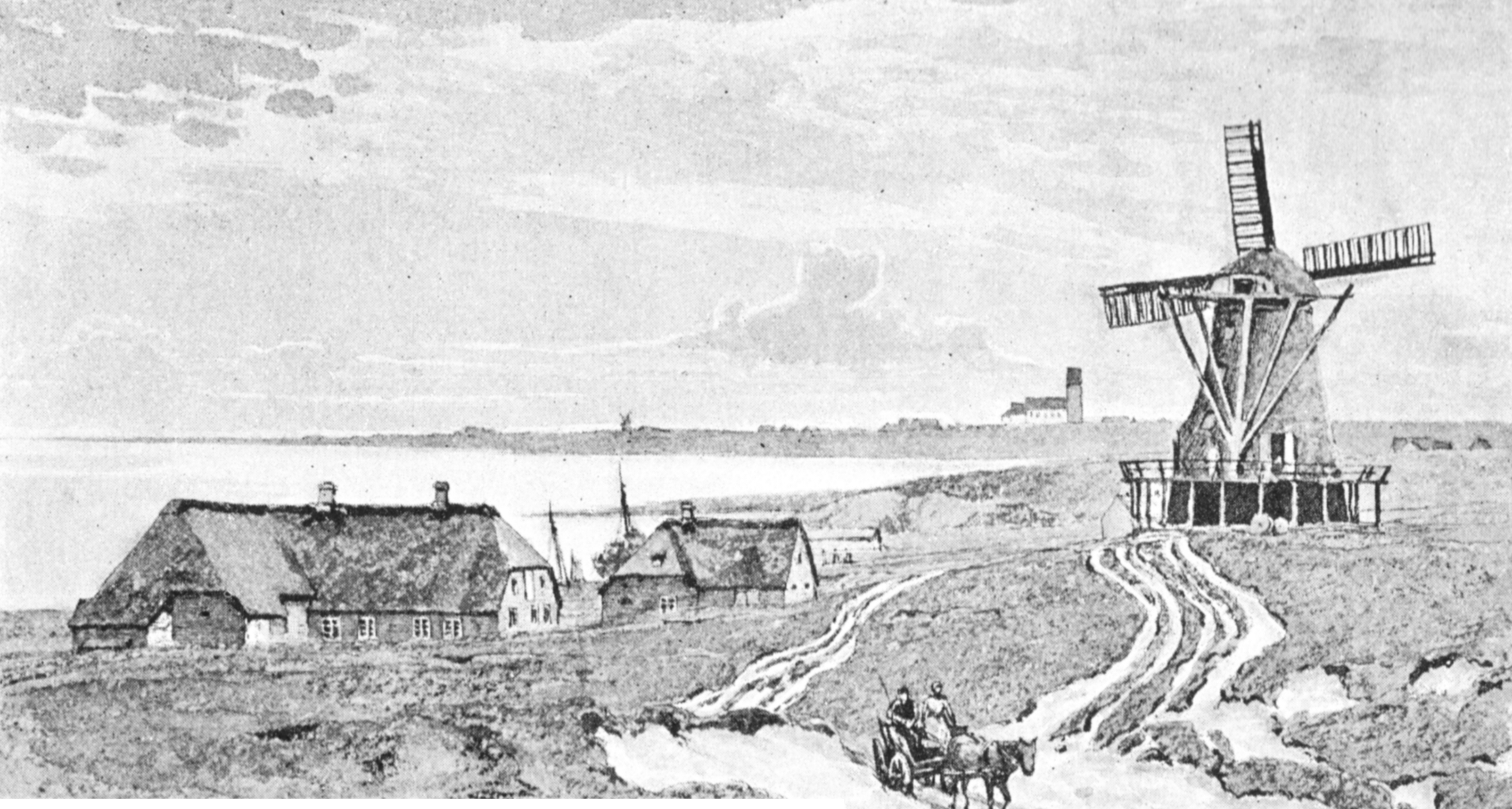 Munkmarsch auf Sylt mit Blick auf Keitum, Zeichnung von Fritz Stoltenberg um 1895